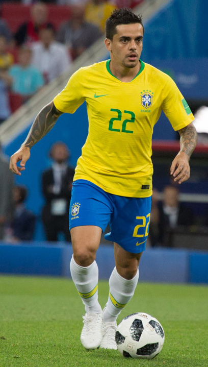 Сборная Бразилии оставляет Сербию за бортом ЧМ-2018 и выходит в плей-офф